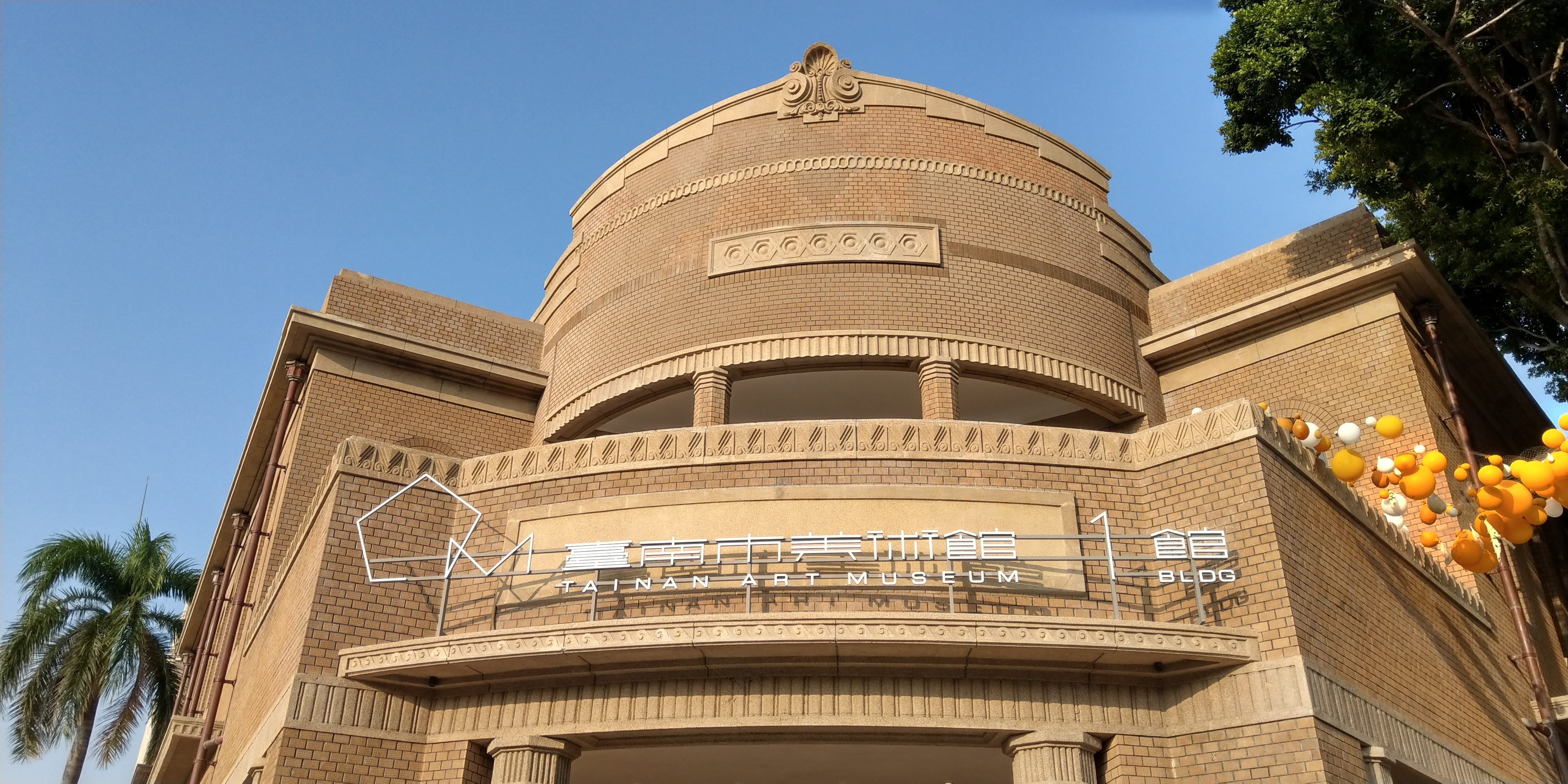 臺南市美術館一館